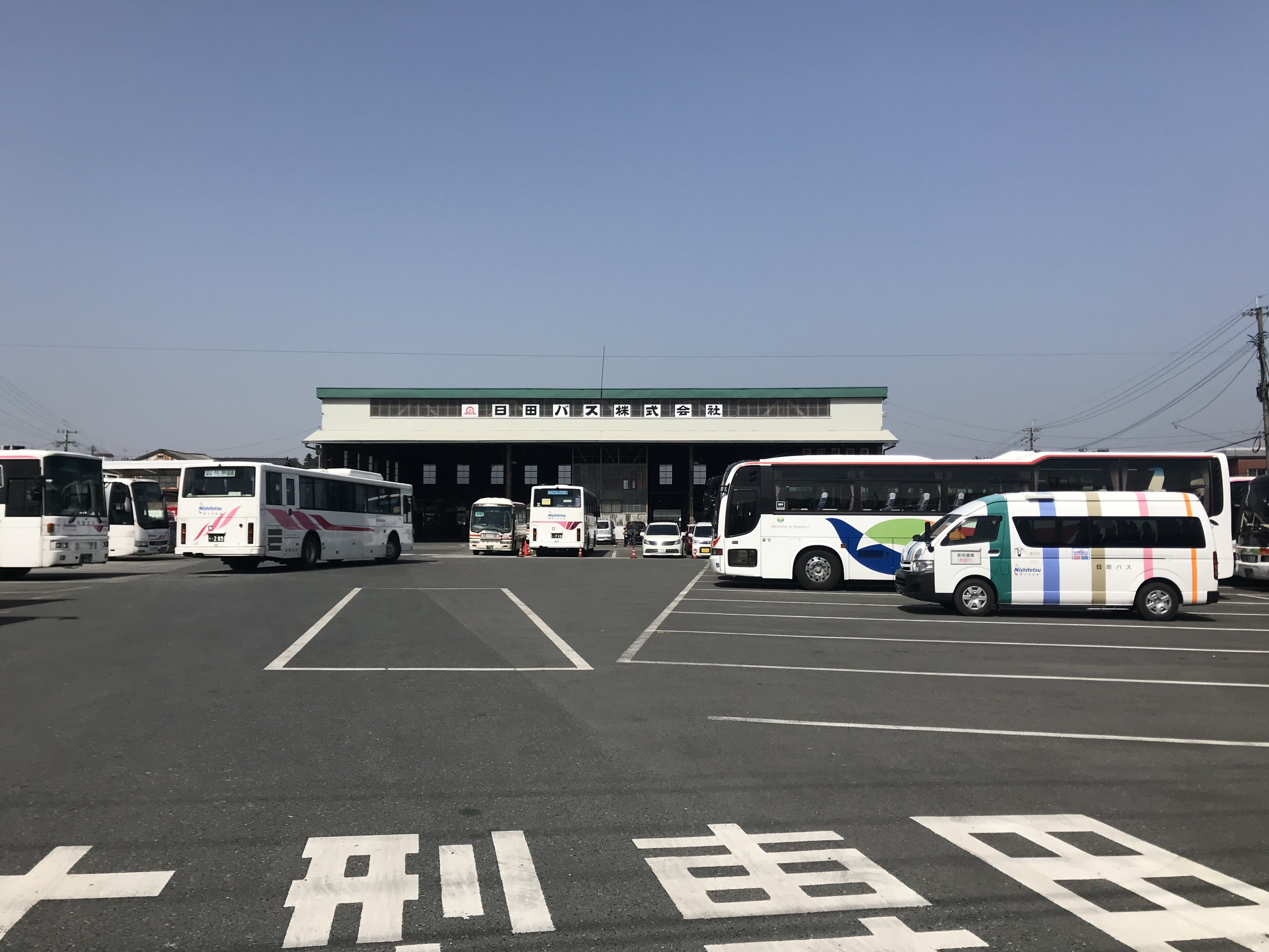 日田バス株式会社・整備工場事務所